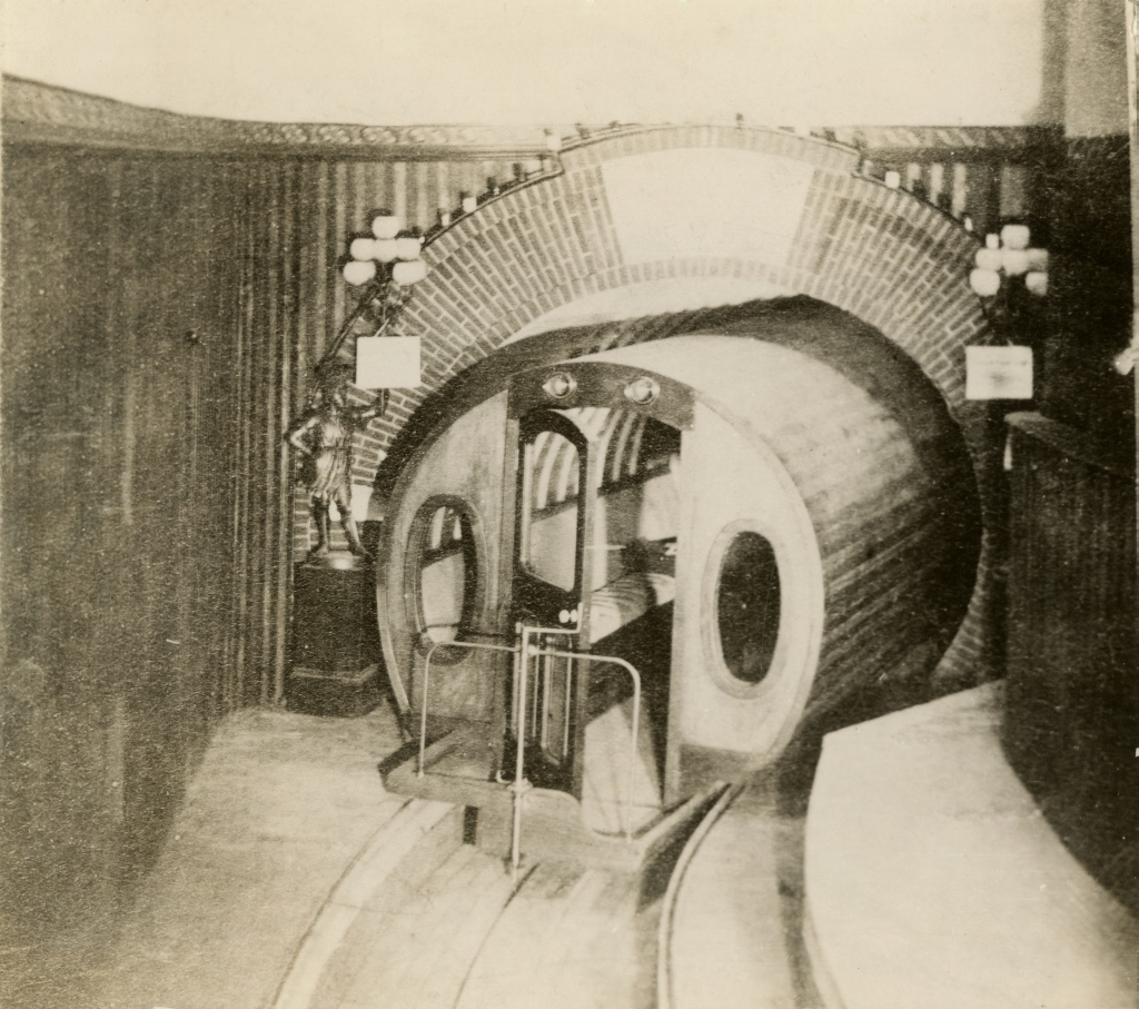 Station, Tunnelportal und Wagen des Beach Pneumatic Transit in New York City. Eröffnet 1870, geschlossen 1875